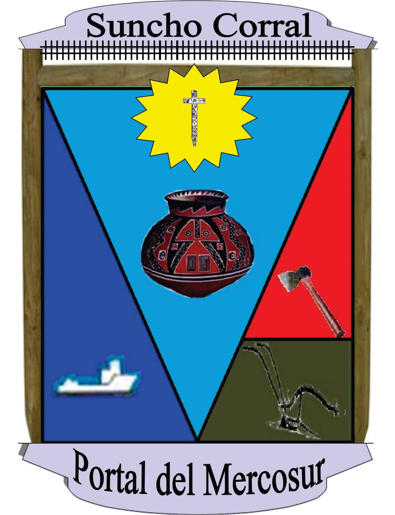 Autor: Pedro Faustino Rimini